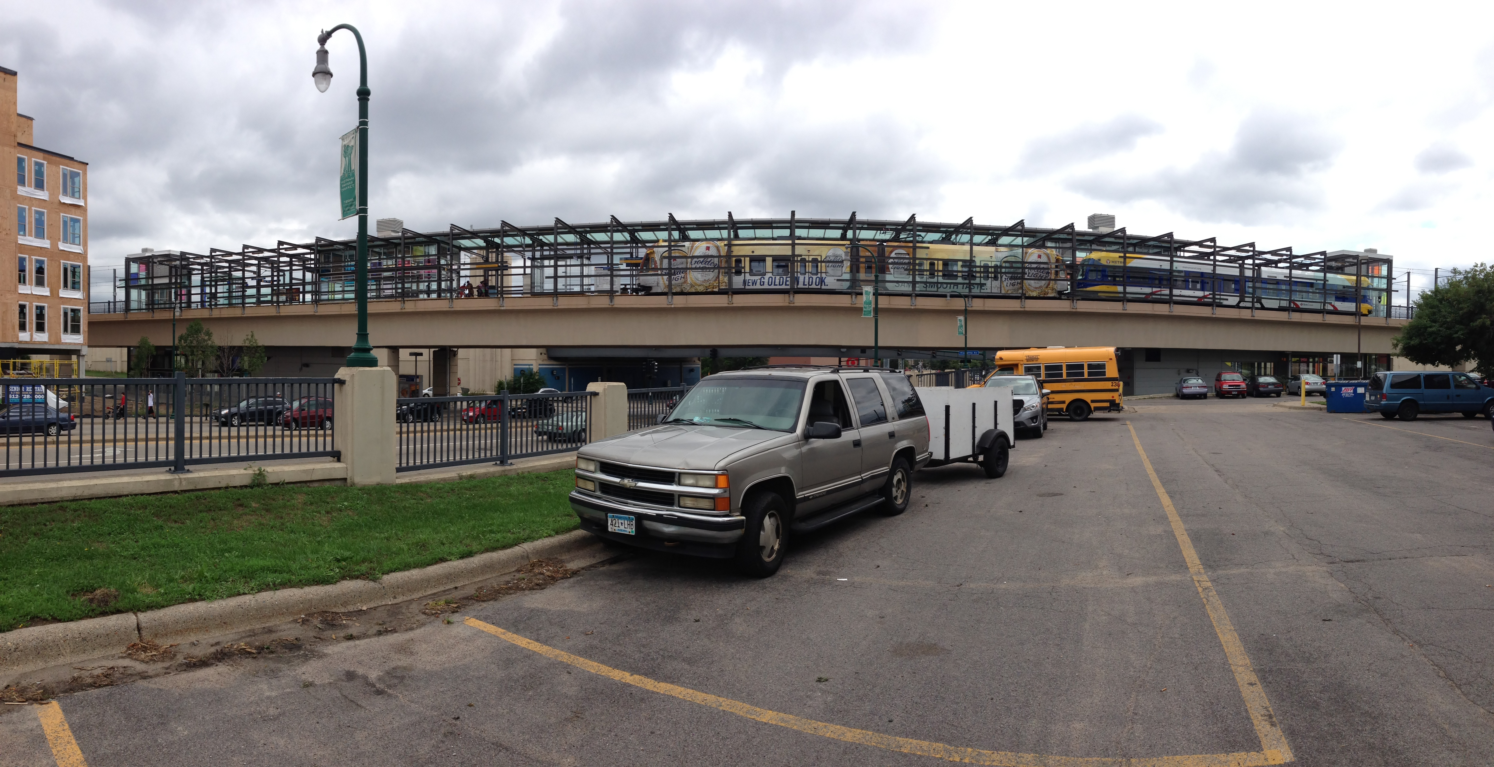 From street parking